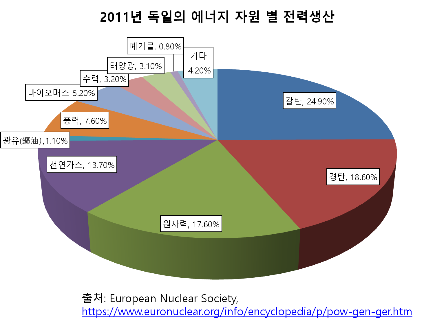 한국어 (조선): 2011년 독일의 에너지 자원 별 전력생산